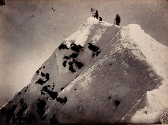 Jungfrau